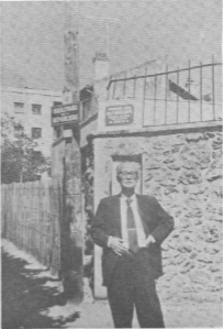 李璜攝於玫瑰城共和街咖啡廳，中國青年黨建黨地。